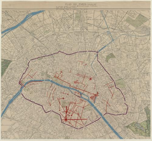 Plan des artistes établi en 1793 reporté sur plan de 1889